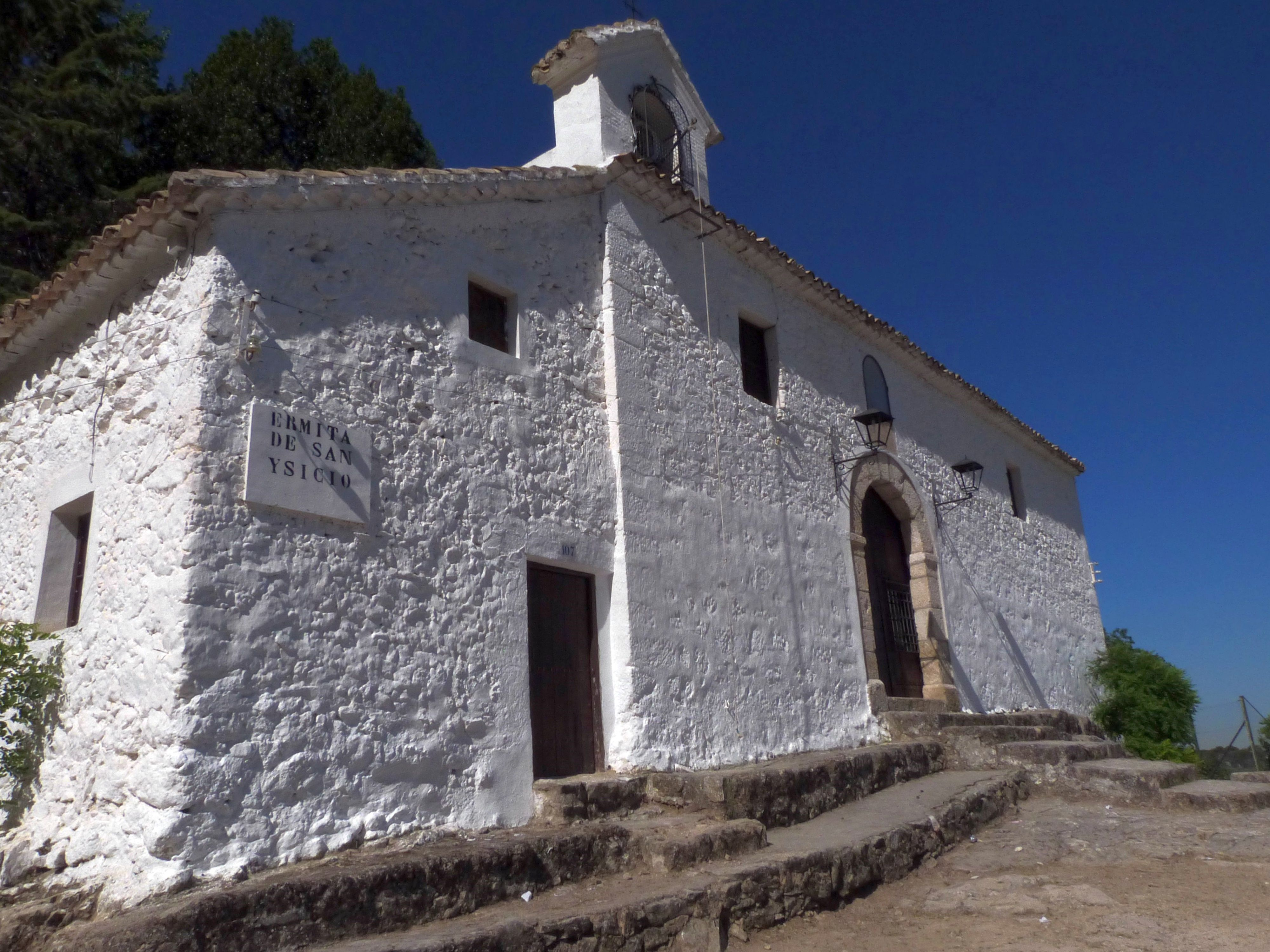 Cazorla, Ermita de San Isicio